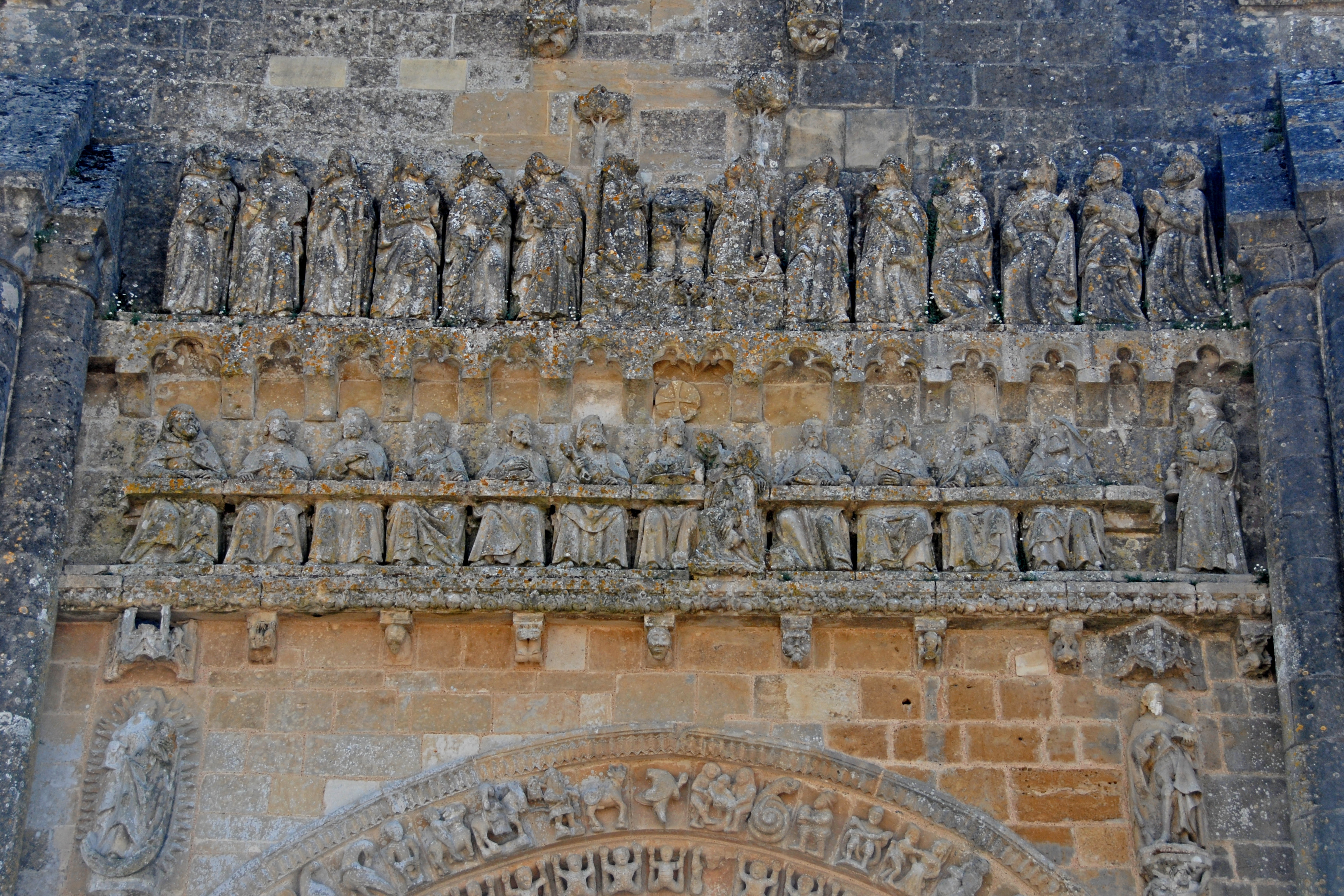 Vouvant, roman. Kirche, Fassadenreliefs